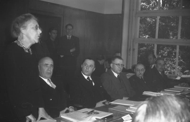 Ministerpräsidenten-Konferenz der Länder der 3 Westzonen Deutschlands auf dem Berghotel Rittersturz in Koblenz (v.l.n.r.: Louise Schroeder, Jakob Steffan, Dr. Peter Altmeier, Adolf Süsterhenn, Dr. Leo Wohleb, Wilhelm Kaisen) 8.-10.7.1948